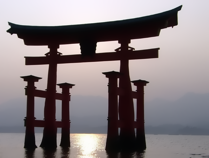 Torii of Itsukushima temple on violet sky.